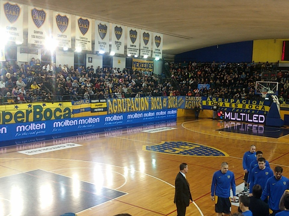 basquet boca juniors vs san lorenzo